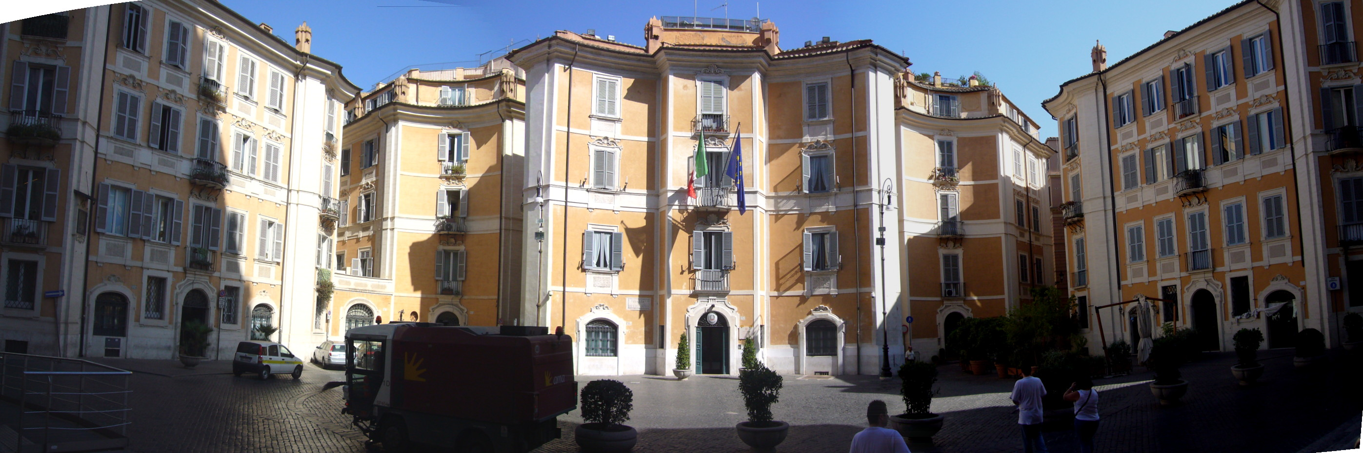 Roma, piazza sant'Ignazio